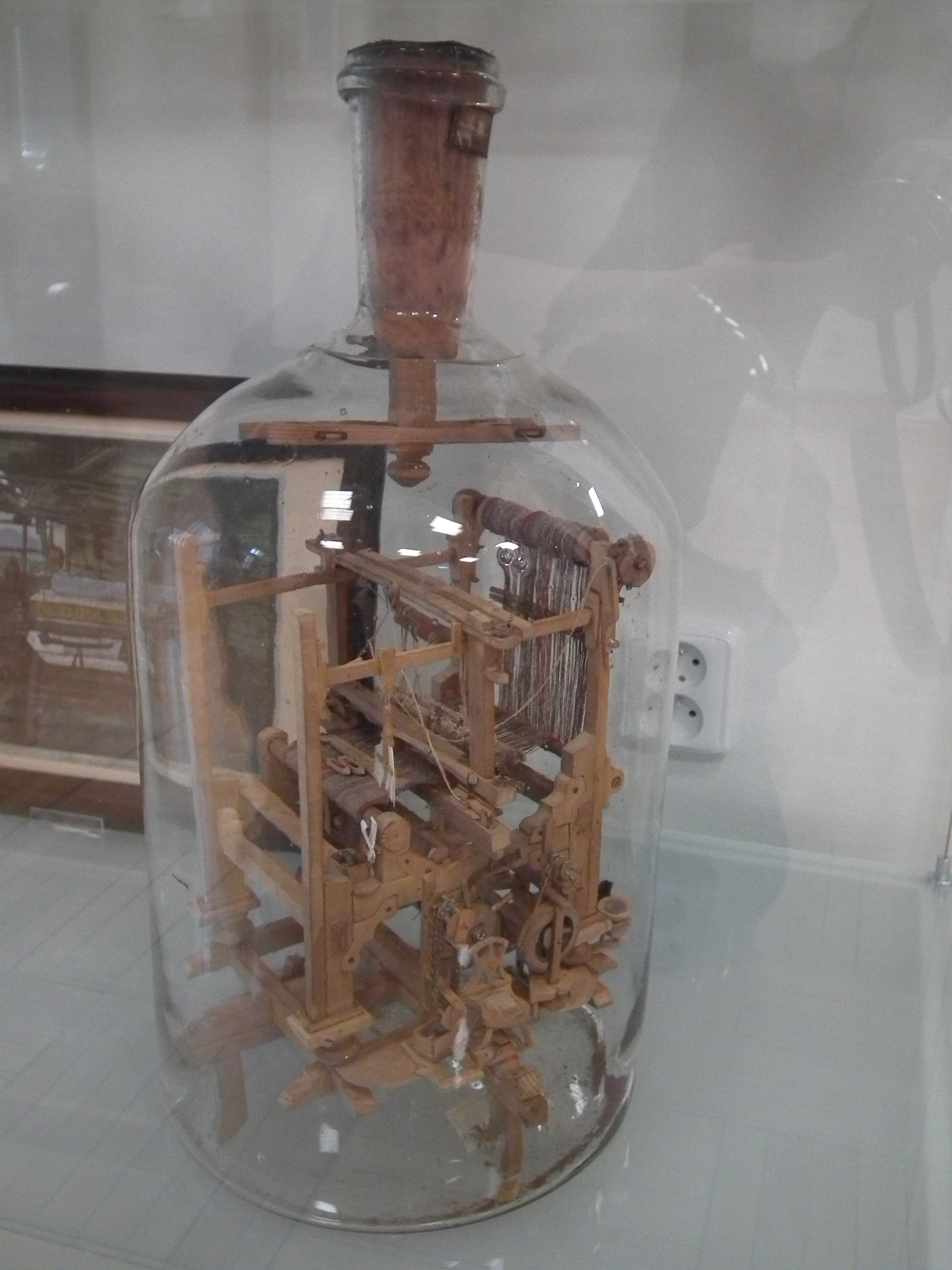 Ausstellung im Stadtmuseum Rumburk